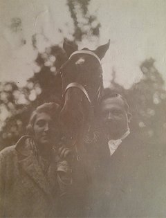 Jerzy Kossak oraz hrabina Gutowska-Zawadzka ok. 1928-30.